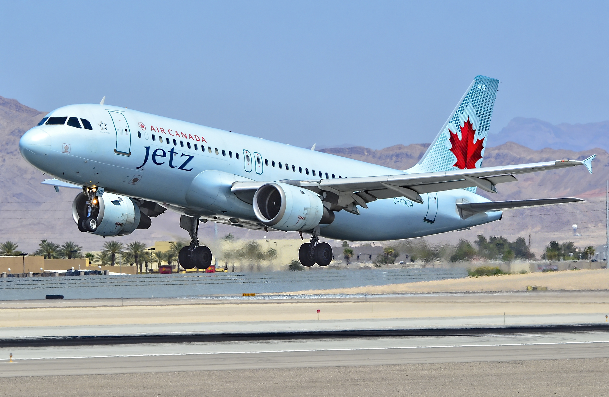 Las Vegas - McCarran International (LAS / KLAS) USA - Nevada, April 17, 2014 Photo: Tomás Del Coro